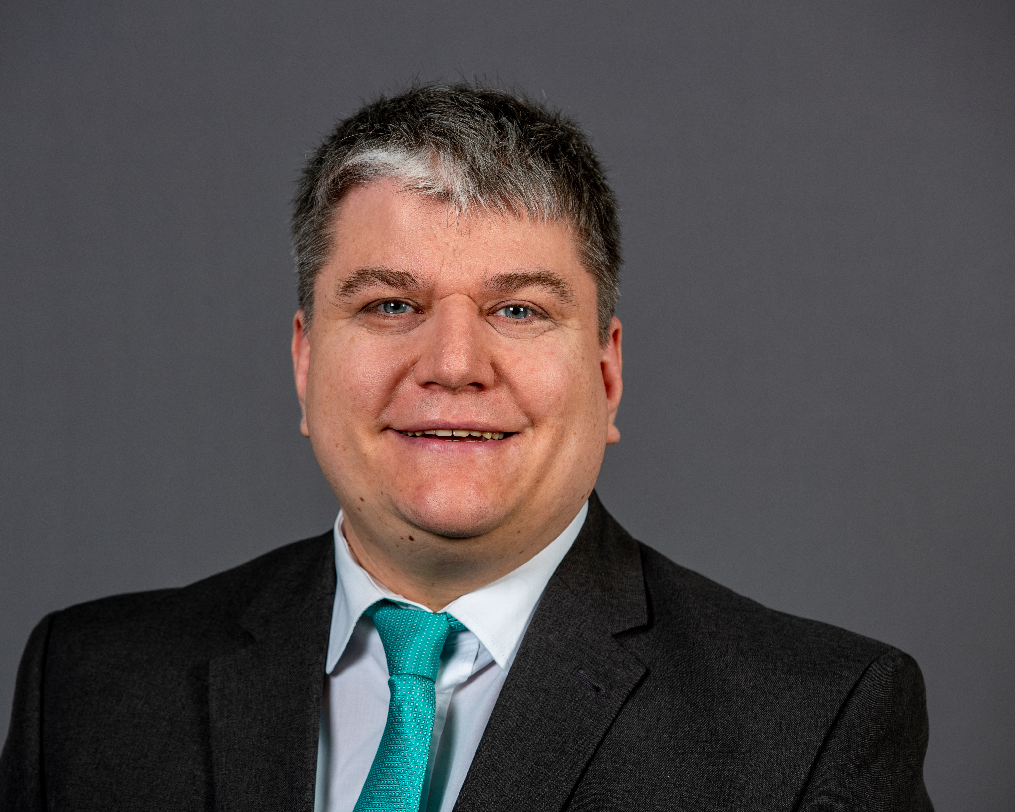 Stefan Schmidt, Bündnis 90/Die Grüne